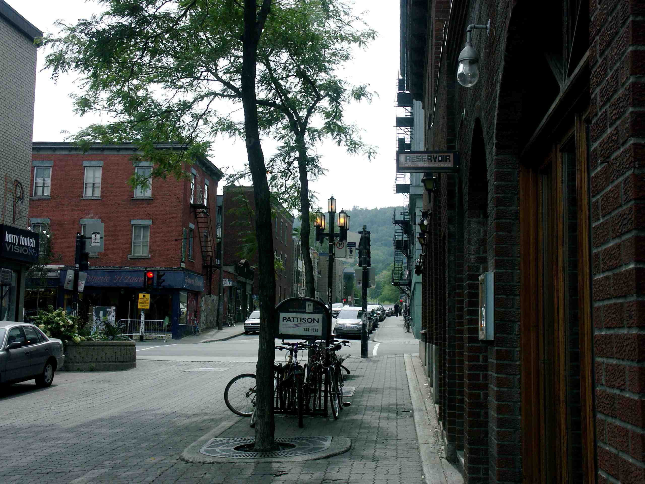 La rue Duluth, intersection boulevard Saint-Laurent avec mont-Royal en arrière-plan, Montréal, août 2005. Photo par User:Gene.arboit.